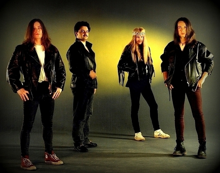 ATTACK (1995)